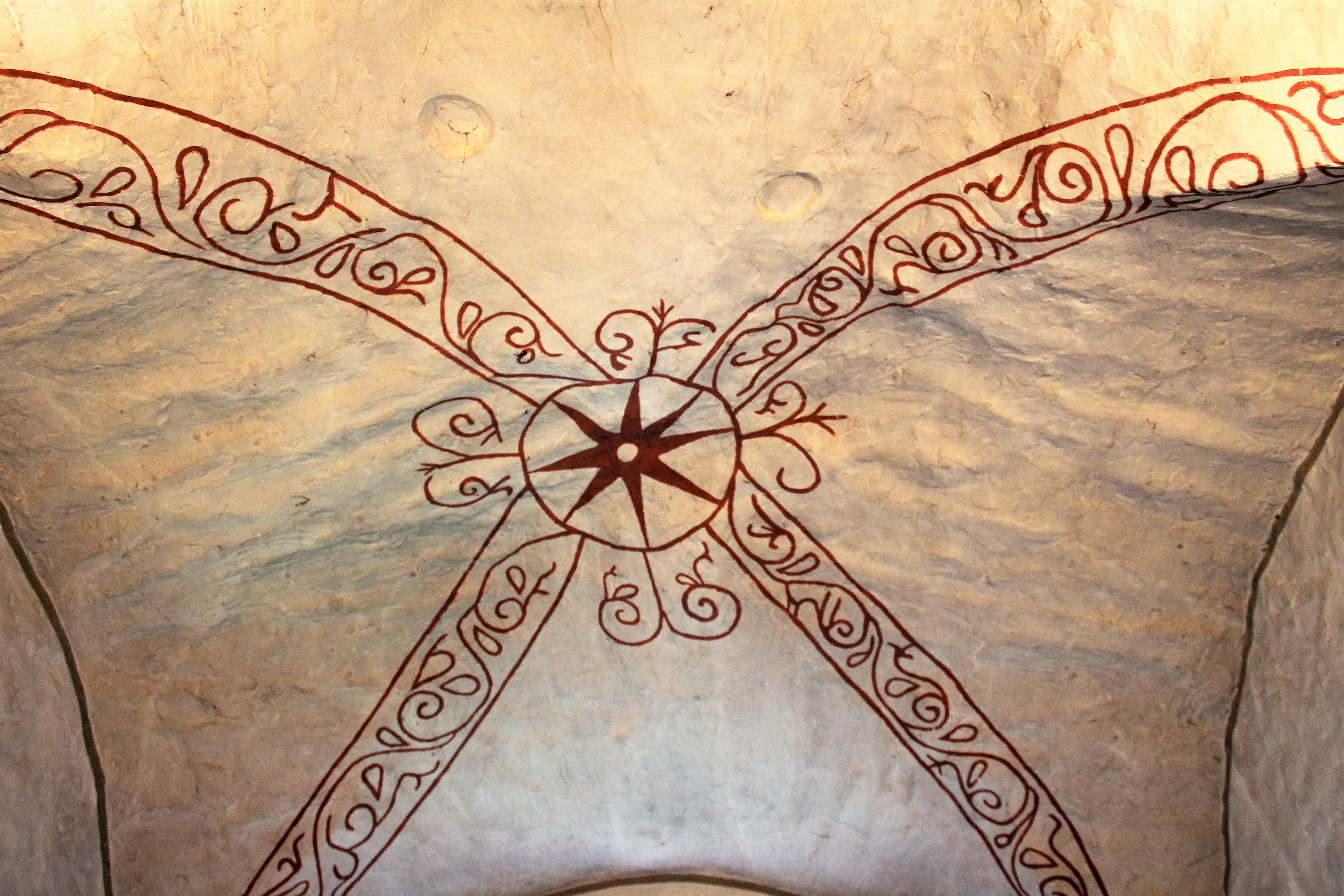 Evanglische Kirche Bortshausen, Landkreis Marburg-Biedenkopf, Hessen, Deutschland